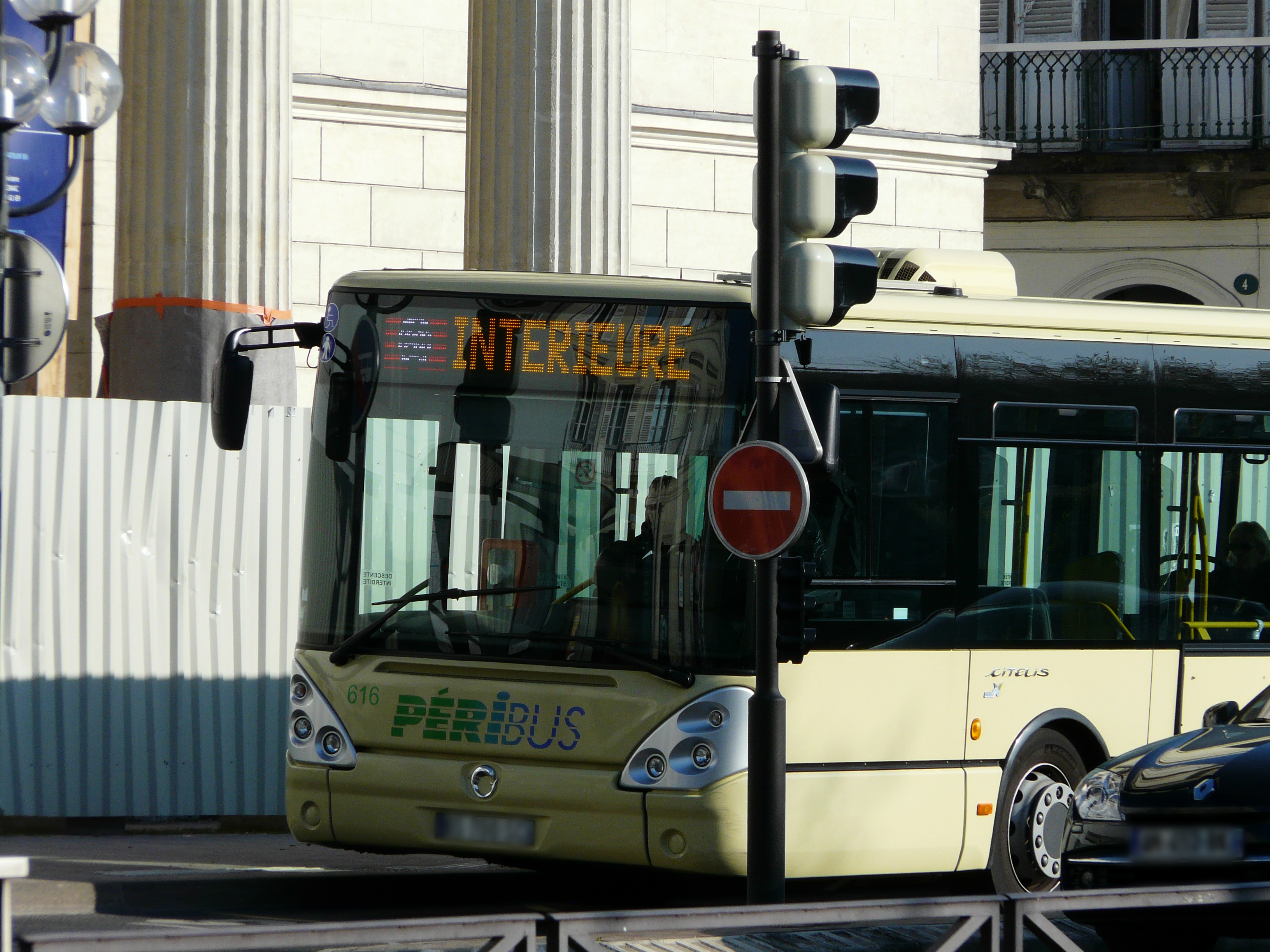 Bus de la ligne intérieure du réseau Péribus à Périgueux, Dordogne, France.